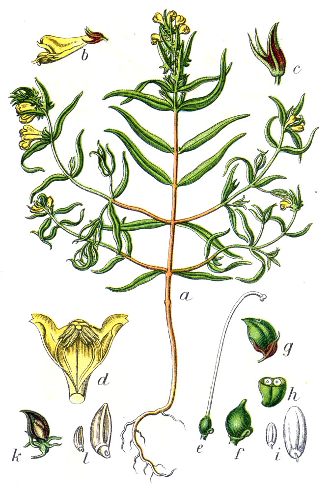 Melampyrum sylvaticum L. Original Caption Gebirgs-Wachtelweizen, Melampyrum silvaticum